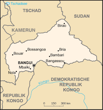 Karte der Zentral Afrikanischen Republik